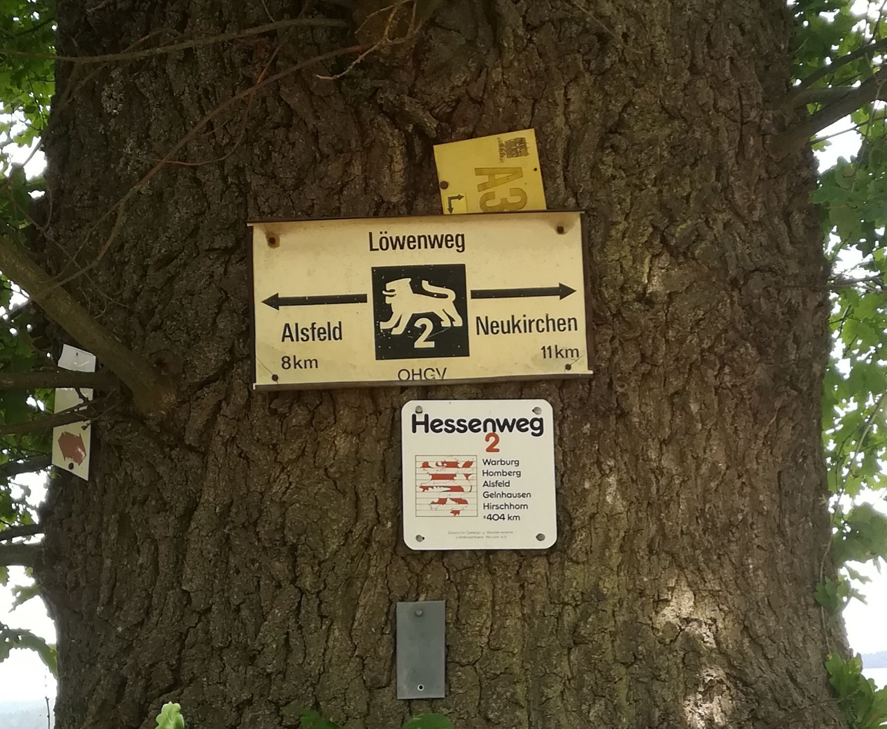 Alte Wegmarkierung Löwenweg mit Schild Hessenweg 2